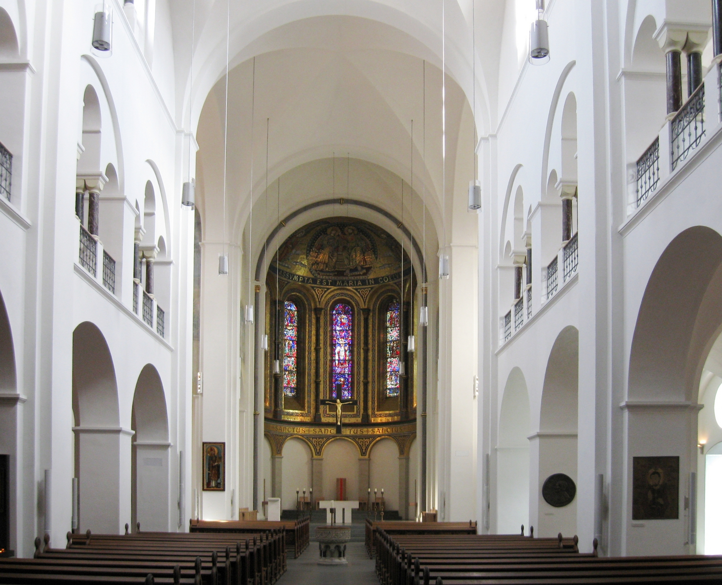 Blick nach Osten